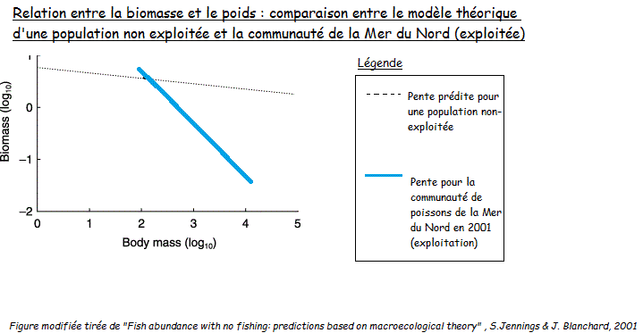 Relation poids/biomasse pour : -modèle théorique population non exploitée (ligne pointillée) -communauté exploitée Mer du Nord en 2001 (ligne bleue)